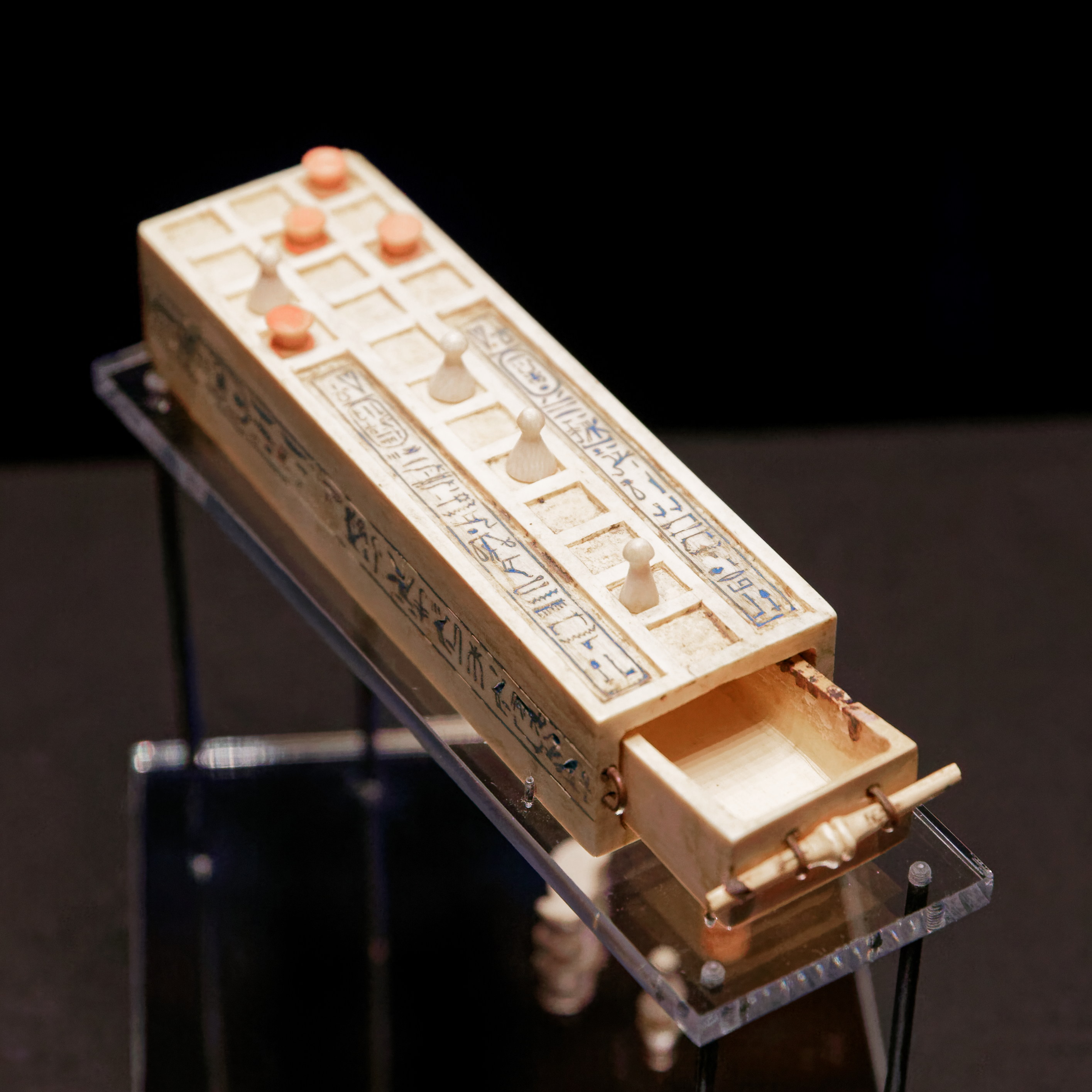 Plateau de jeu miniature en ivoire